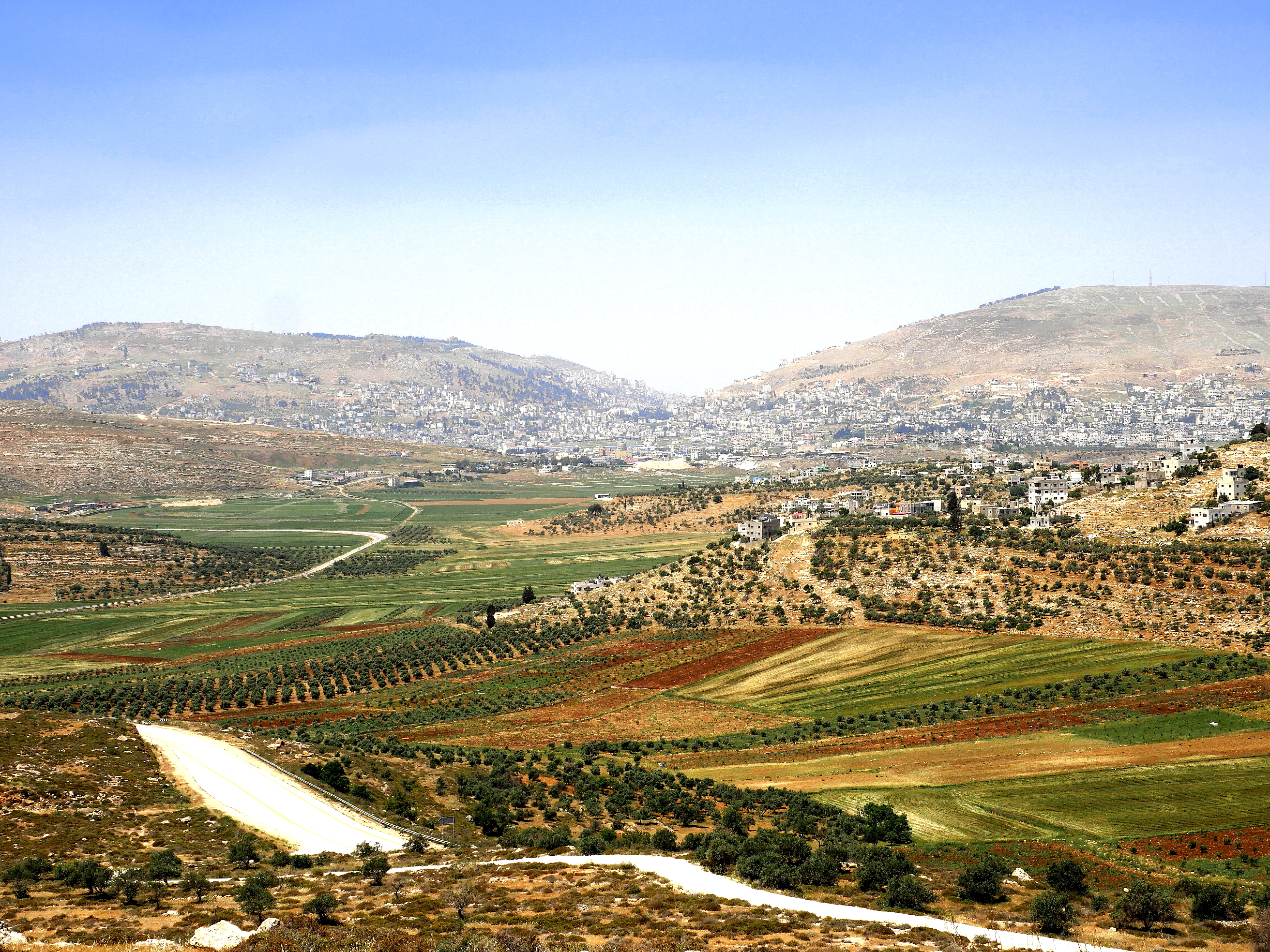 הר גריזים והר עיבל במבט ממזרח (הר גריזים משמאל והר עיבל מימין). ביניהם העיר שכם.